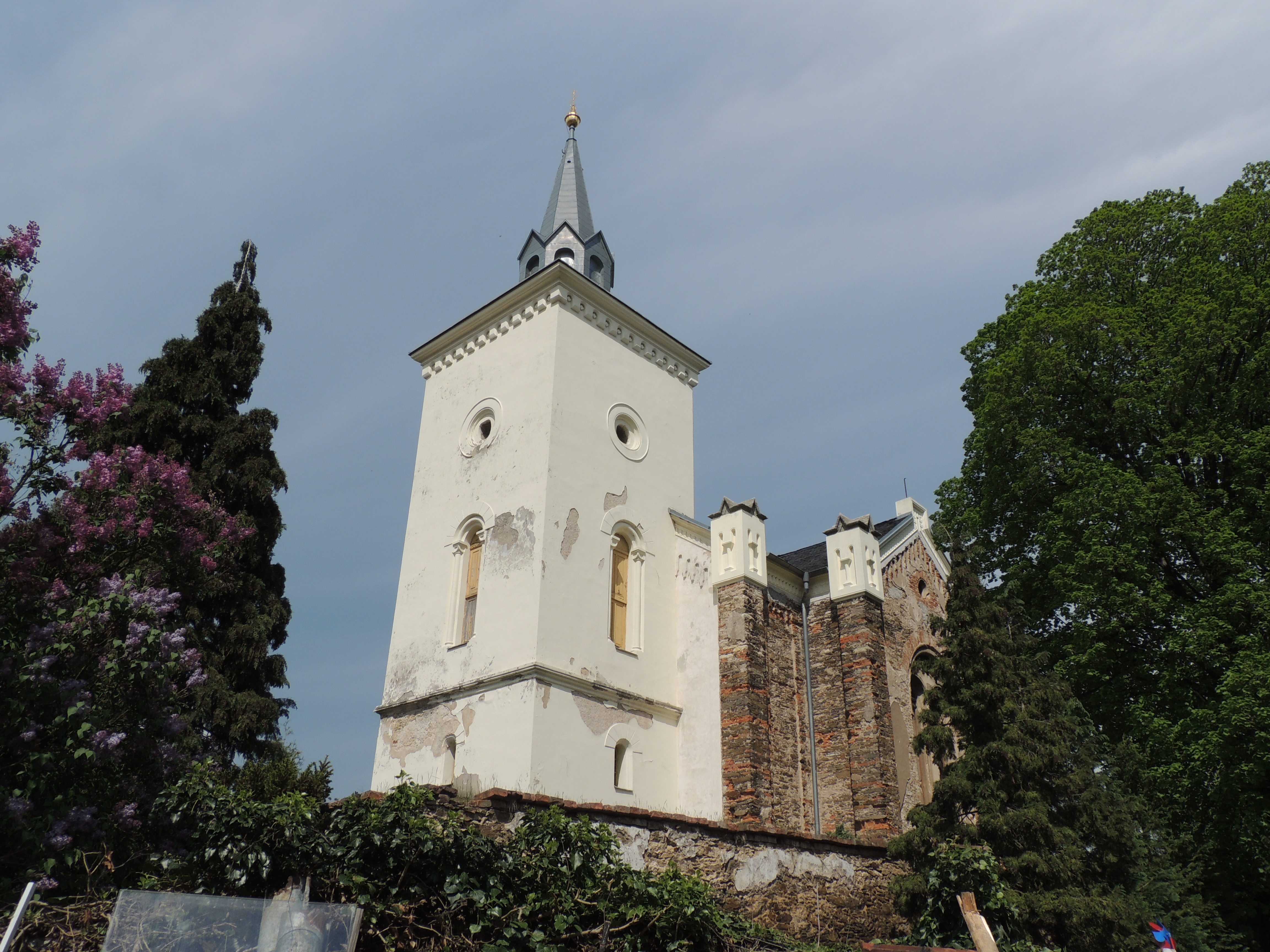 Kostel sv. Martina - areál (Zibohlavy), uprostřed obce, Zibohlavy